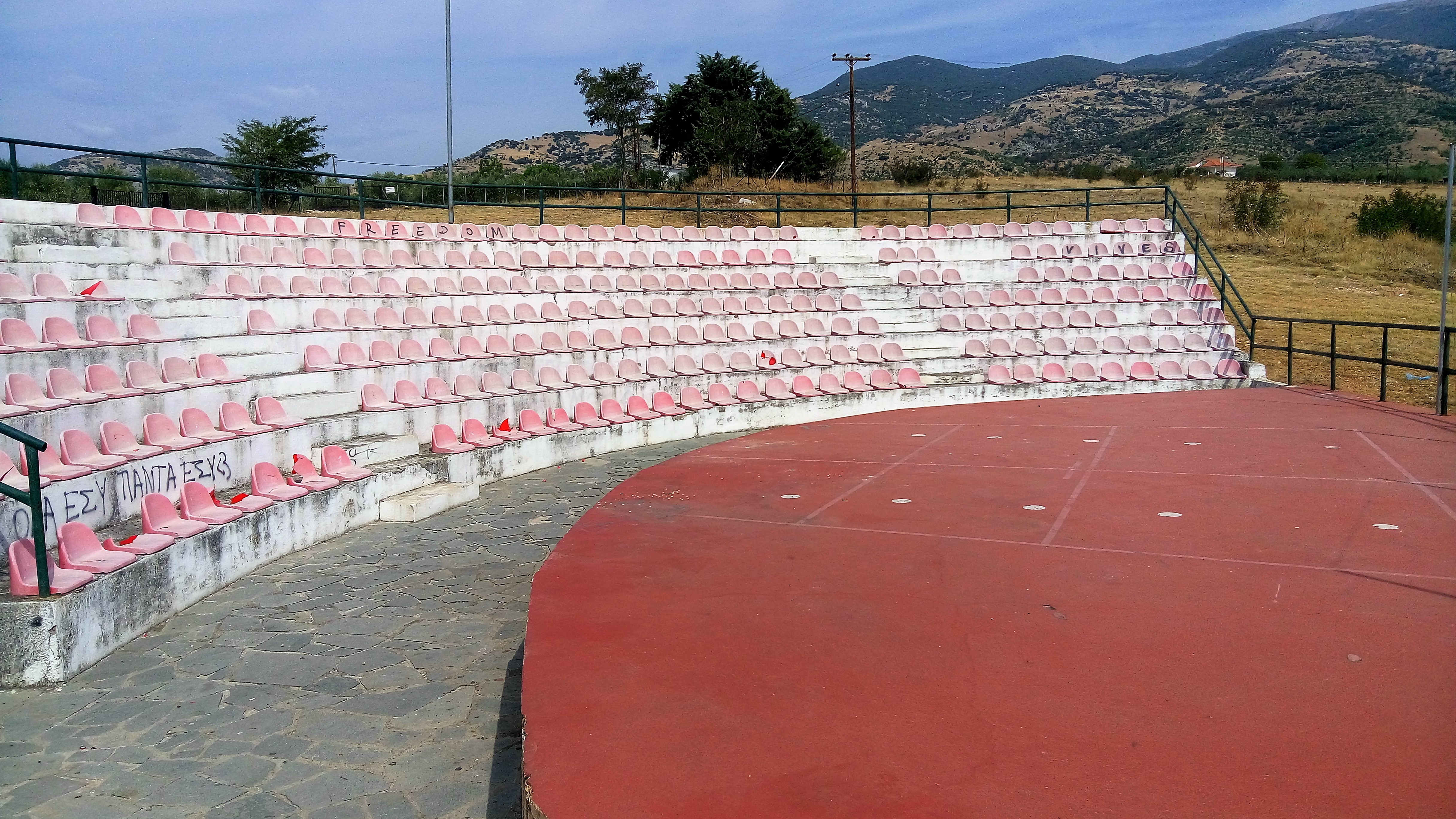 Σύγχρονο ανοιχτό θέατρο που χρησιμοποιείται για πολιτιστικούς σκοπούς. Βρίσκεται στον λόγο του Μπουζιάρου στην δυτική πλευρά του χωριού. Κατασκευάστηκε το 1998.